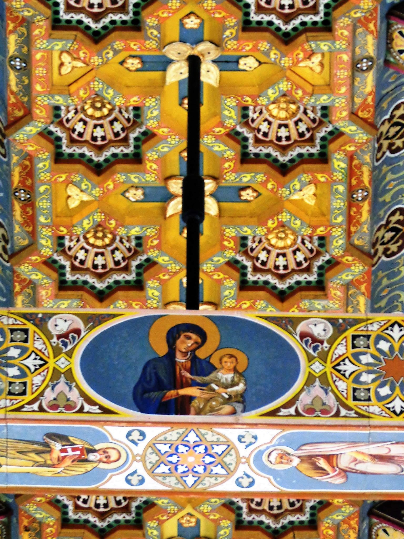 Dettaglio tetto ligneo